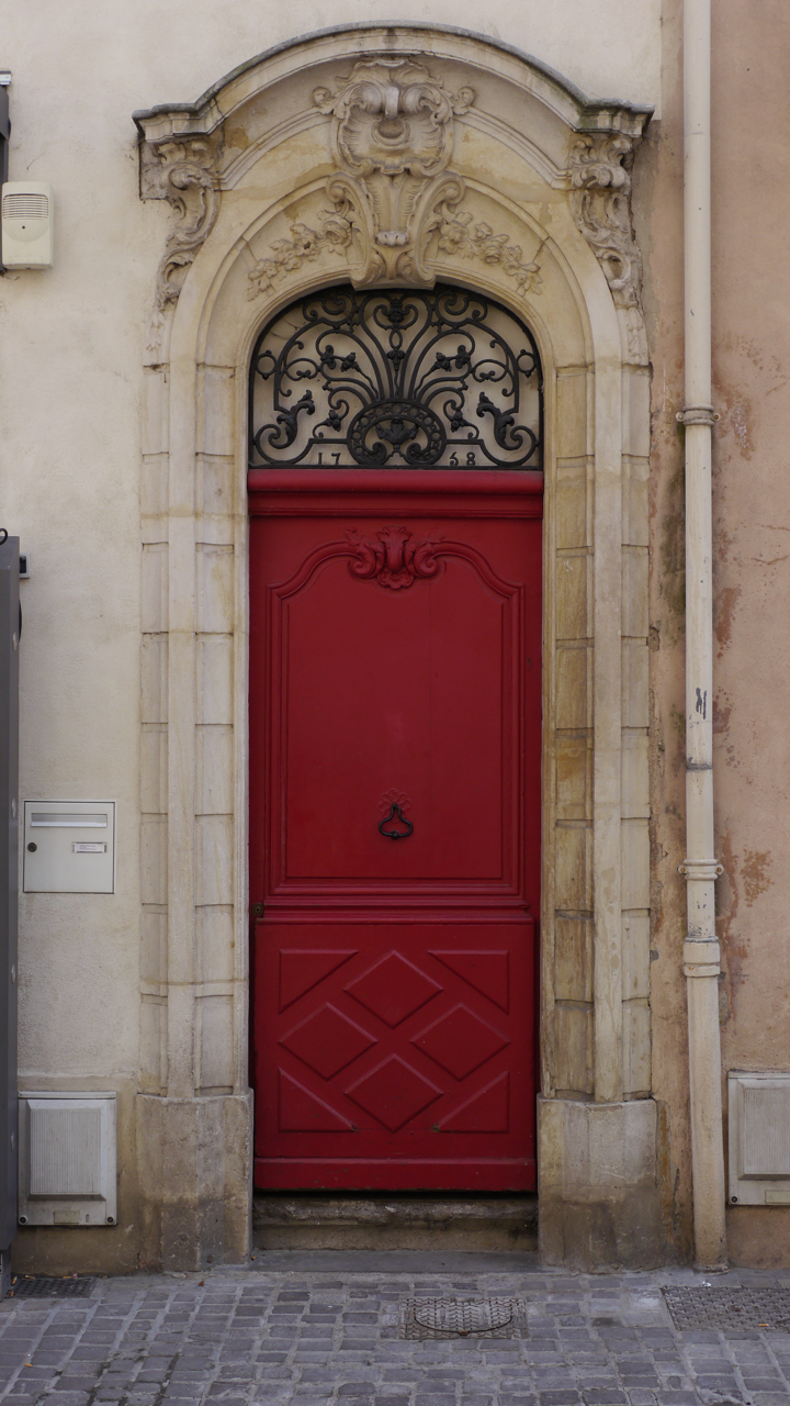 porte à vantail du XVIII° .